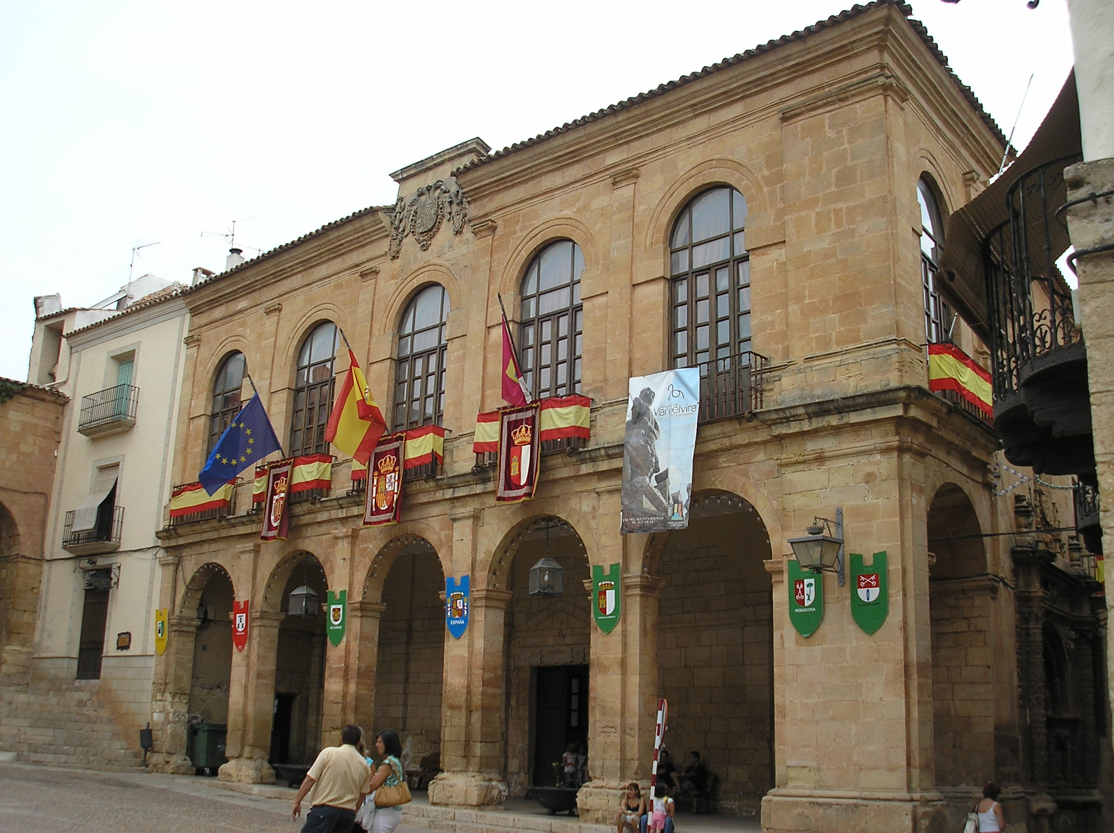 Ayuntamiento. Taken by Valdoria sept 2006 Alcaraz. Prov. Albacete. Spain.